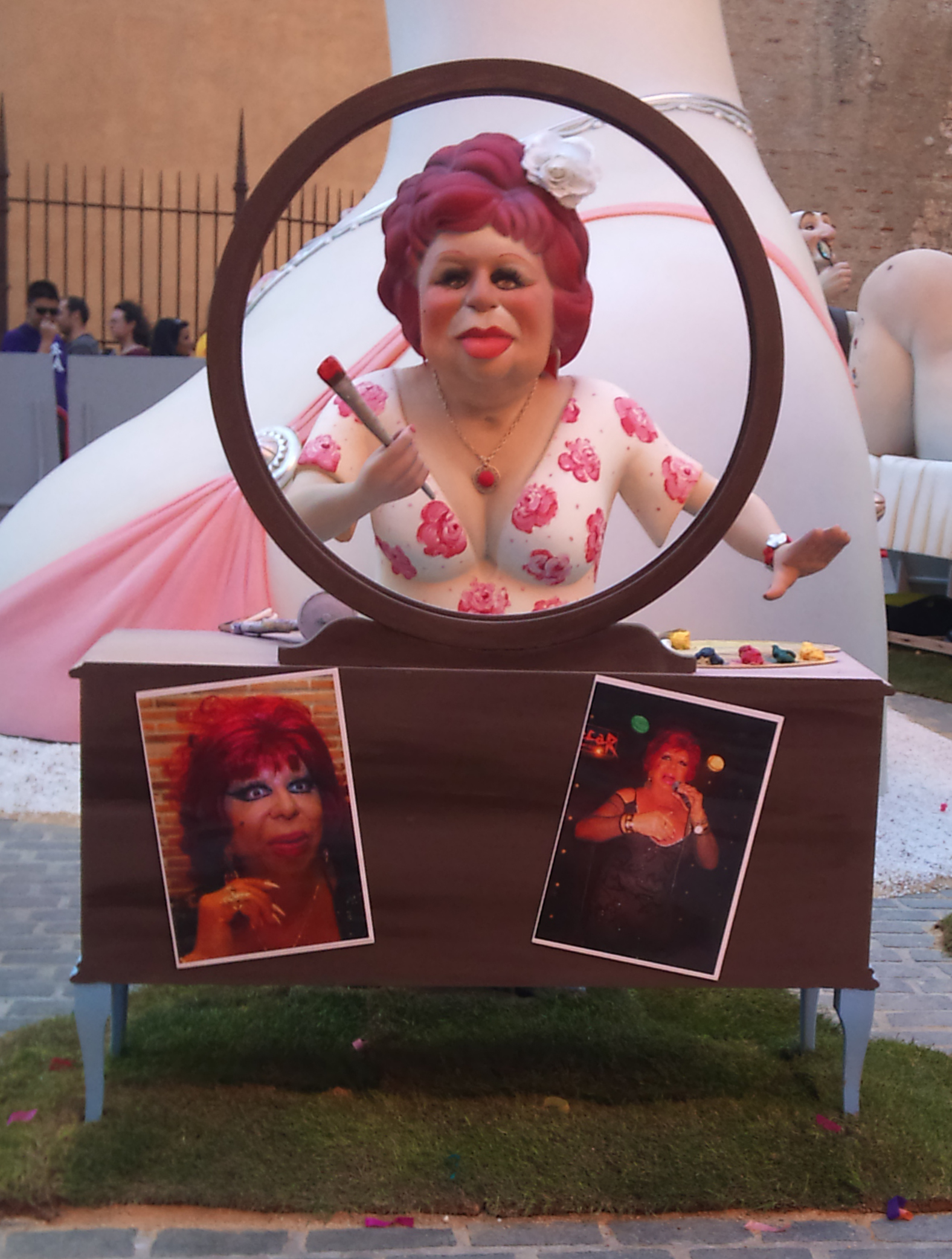 Detalle de una falla valenciana en el que se muestra una representación de Carmen de Mairena.